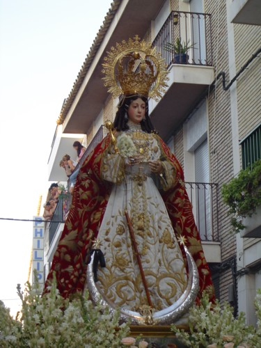 Estepa: Virgen de la Asunción en su parihuela durante la feria